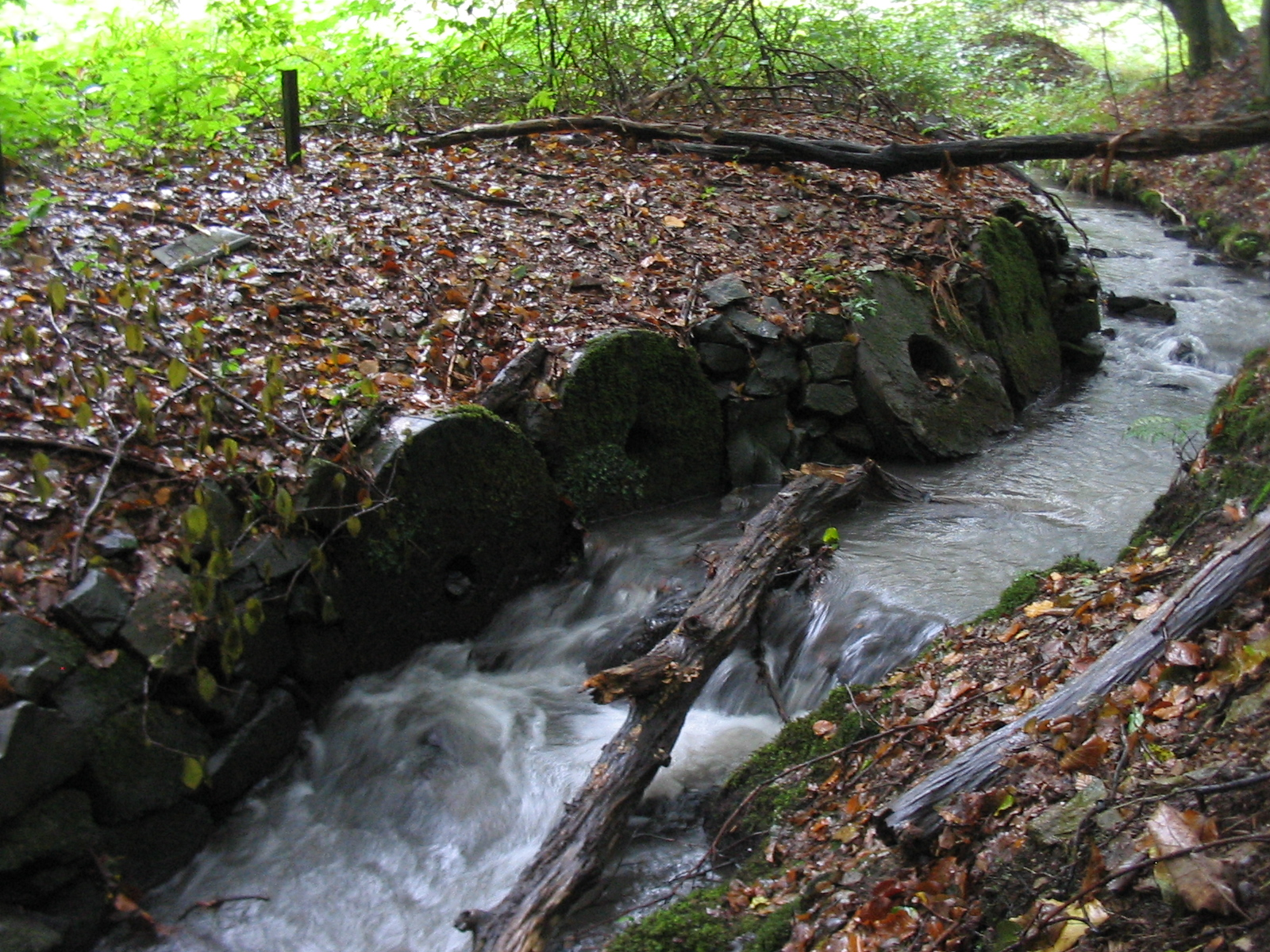 alte Bachbefestigung am Kaltenbach unterhalb des Manuelkottens